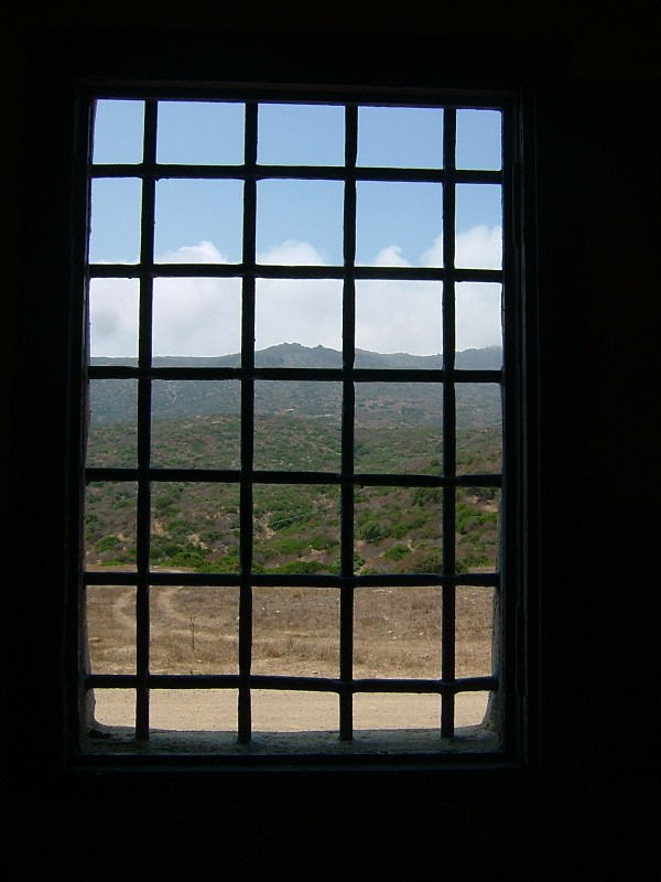 Opera di Federico Gandolfi , estate 2006